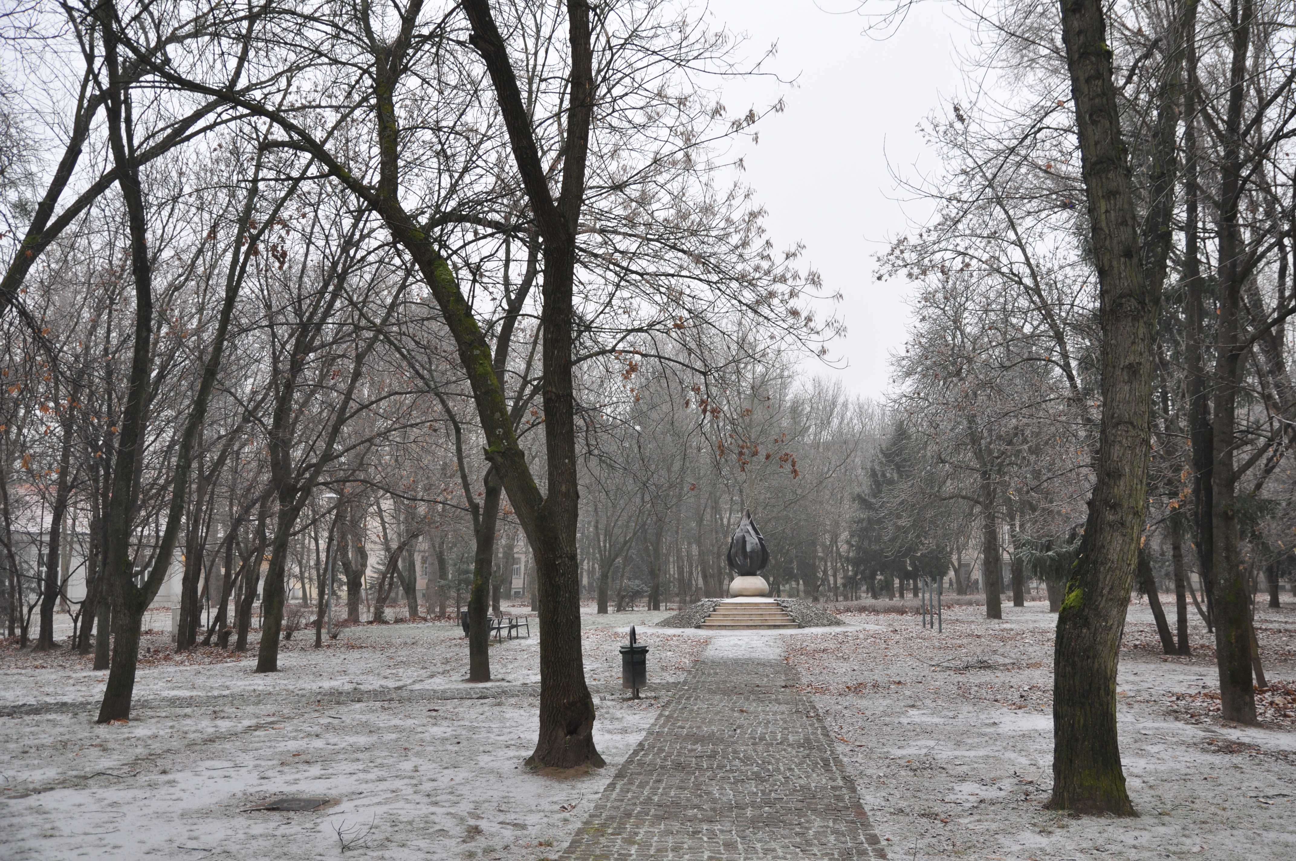 Budapest, Erzsébetliget, Láng, 1956-os emlékmű (R. Törley Mária, 2006). Leírása: Az utcakövekből emelt halmon, méteres kőgolyóból csapnak fel a három méter magas bronz lángnyelvek. Forrás: kozterkep - Magyarország, Budapest, XVI. kerület, Erzsébet liget, Szurmay Sándor fasor, a színház bejáratától induló sétány végén. (Itt működött a volt Szovjetunió mátyásföldi katonai bázisa.)